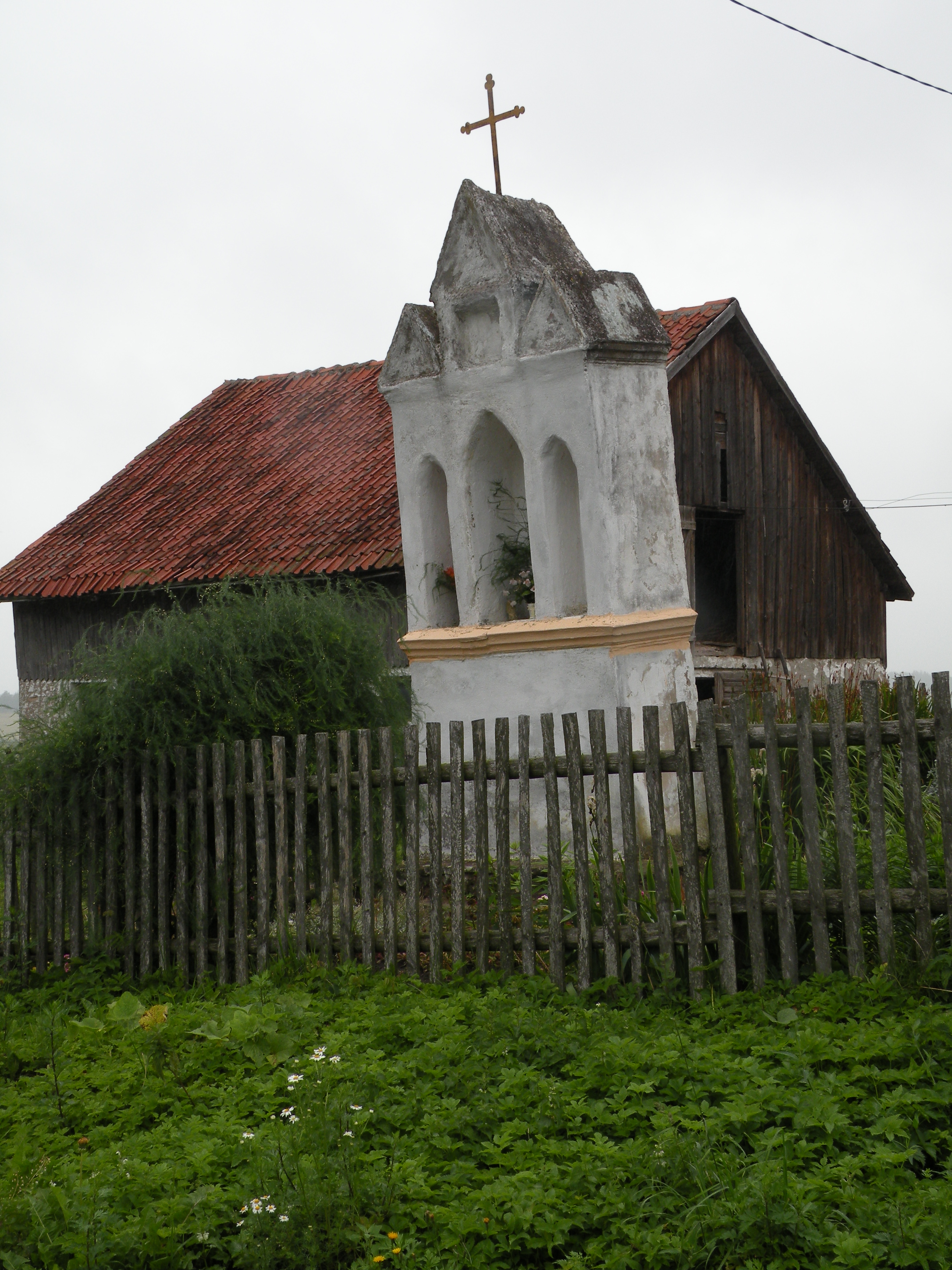 Kabiny